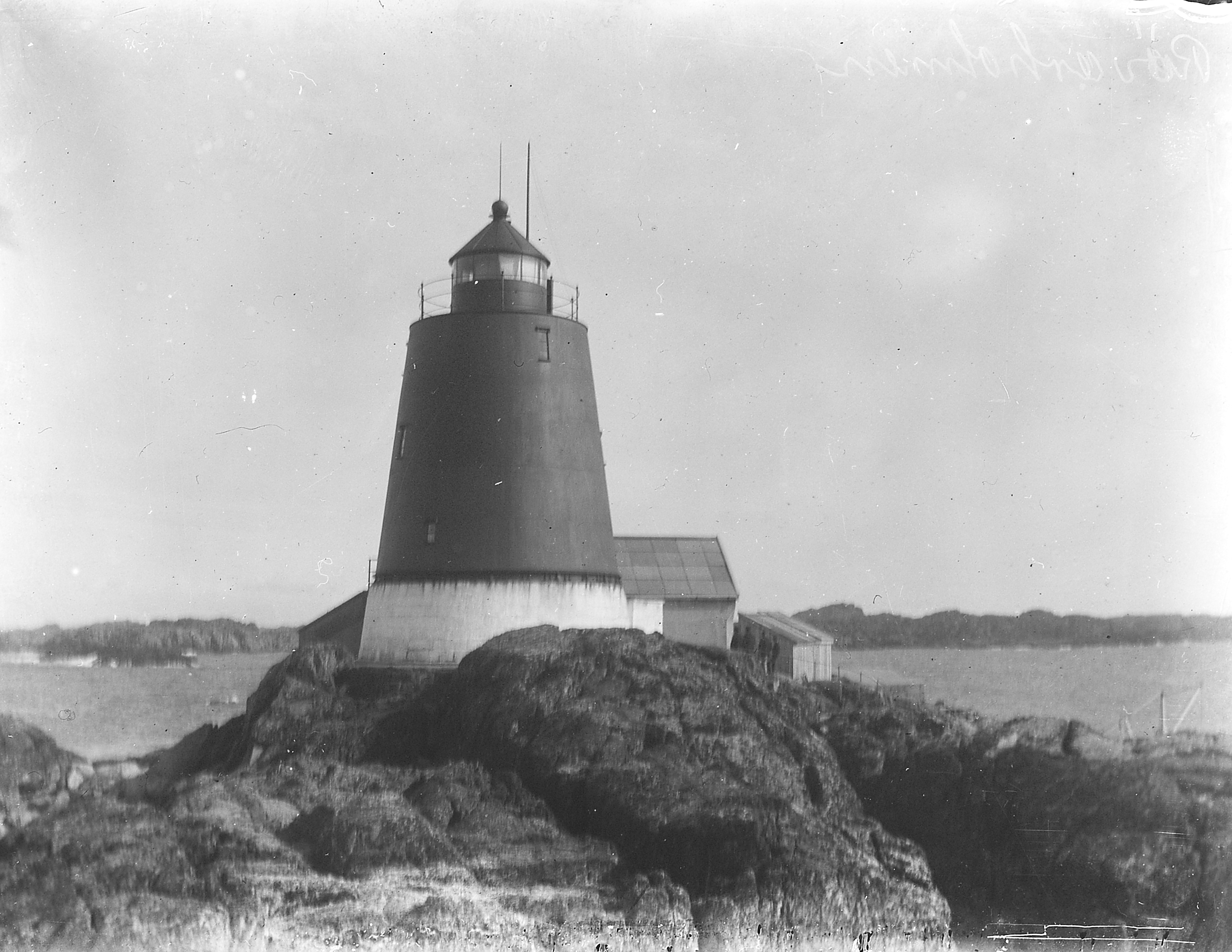 Bildet er hentet fra Arkivverket. Røværsholmen, Haugesund Arkivinstitusjon : Riksarkivet Arkivnavn : Fyrdirektoratet Sted : Norge, Rogaland, Haugesund, Emneord: Fyr, Kyst Avbildet